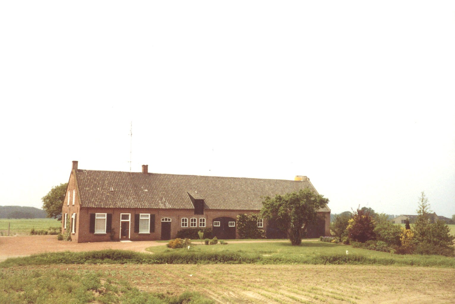 boerderij in Vlierden (N.Br.)